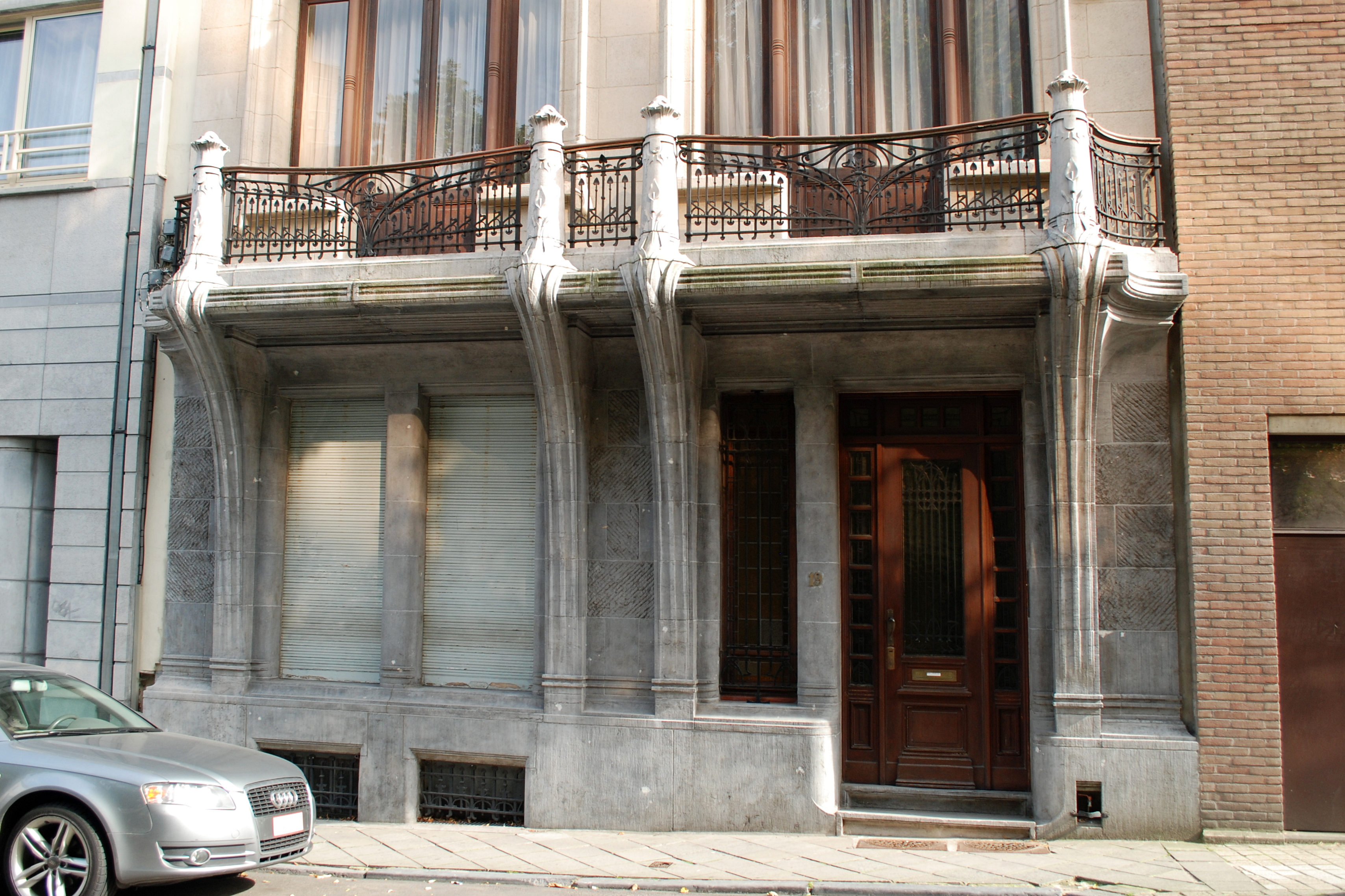 Belgique - Bruxelles - Hôtel du baron Buffin